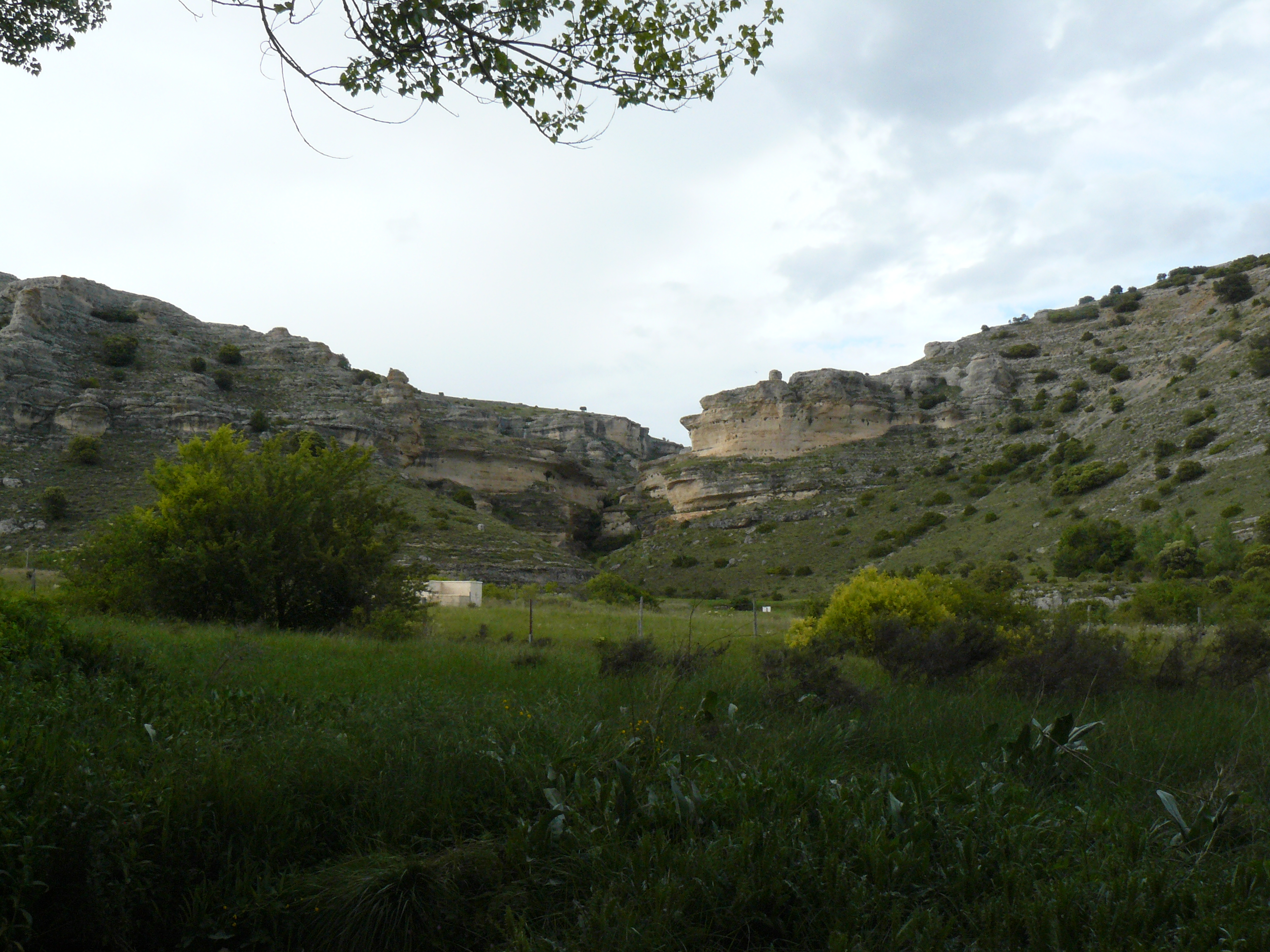 Zona de cañones cerca de Somolinos, Guadalajara.